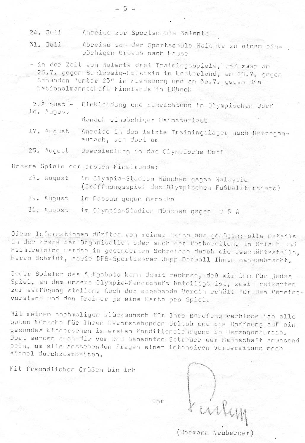 Berufung der Fußball-Olympiamannschaft des DFBs 1972.